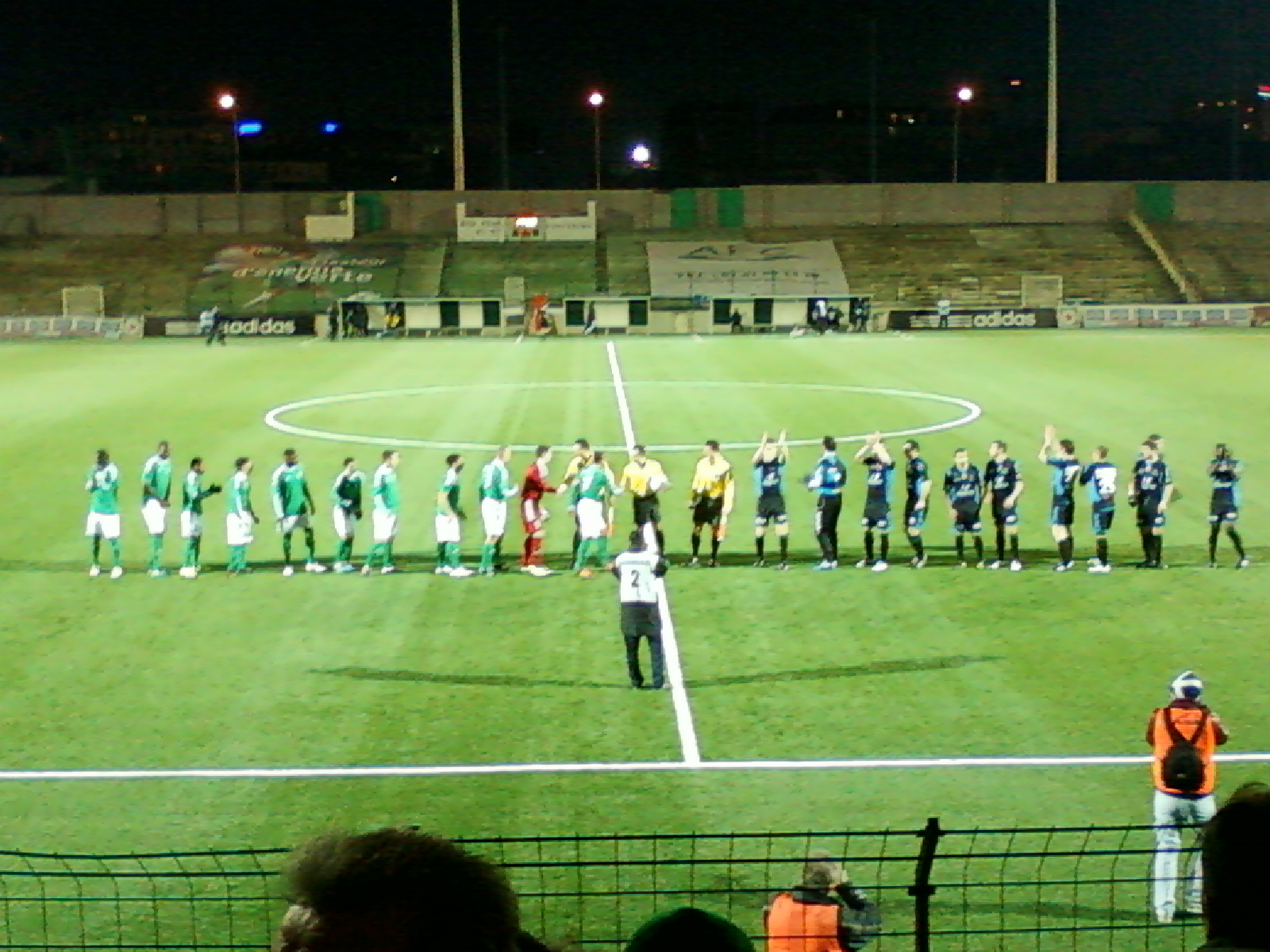 Présentation des équipes lors du match Red Star - Rouen du 14 janvier 2012 au stade Bauer